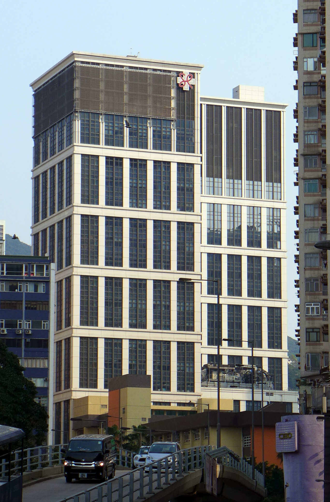 St Pauls Hospital